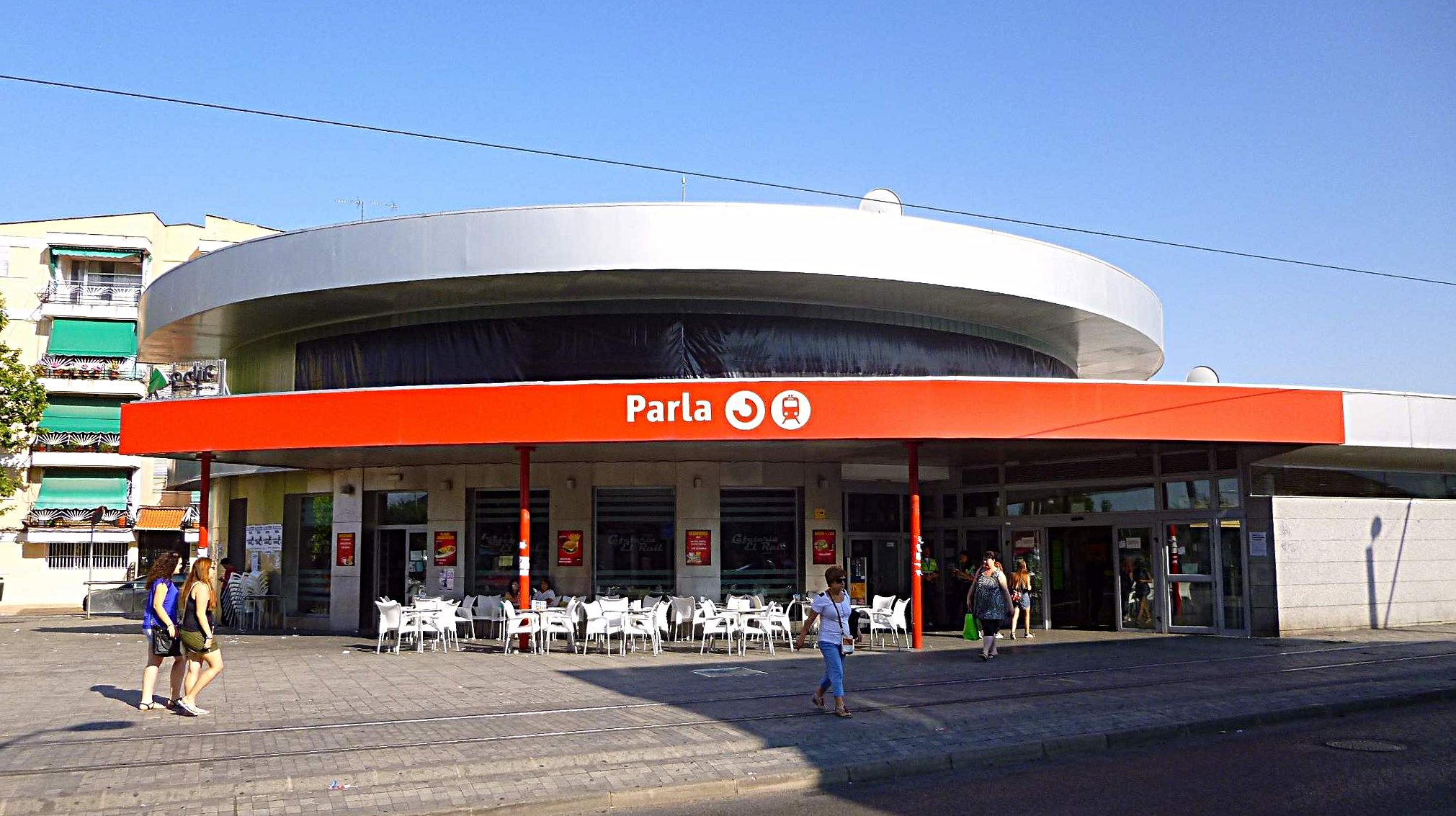 Estación de tren de cercanías de Parla (Comunidad de Madrid).